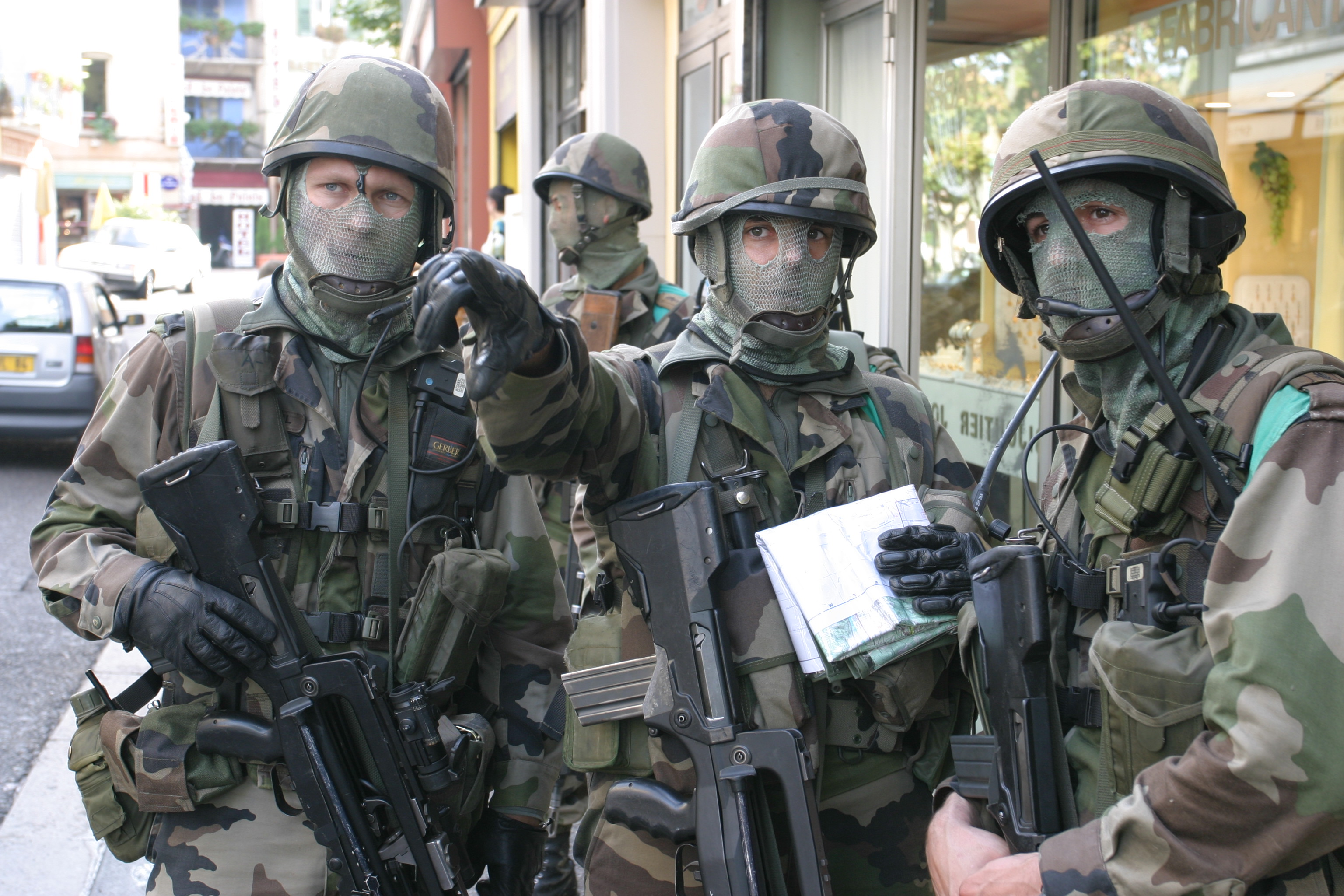 groupe de combat du 2e régiment étranger d'infanterie en combat ZURB (zone urbaine) en France en 2004 en tenue de camouflage Europe centrale